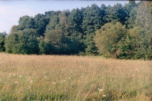 Cieszeniewo. Łąka trzęślicowa